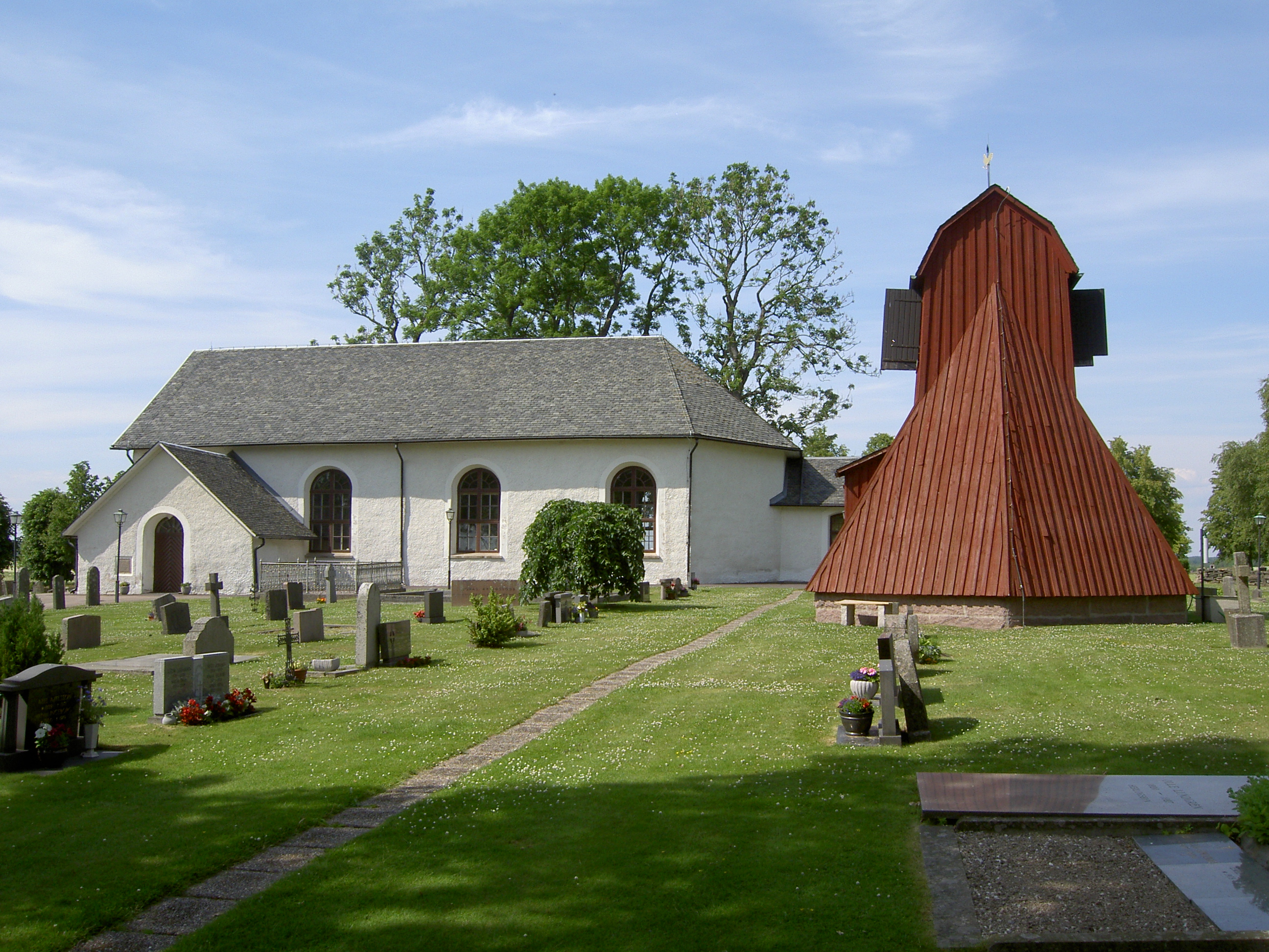 Holms kyrka med klockstapel